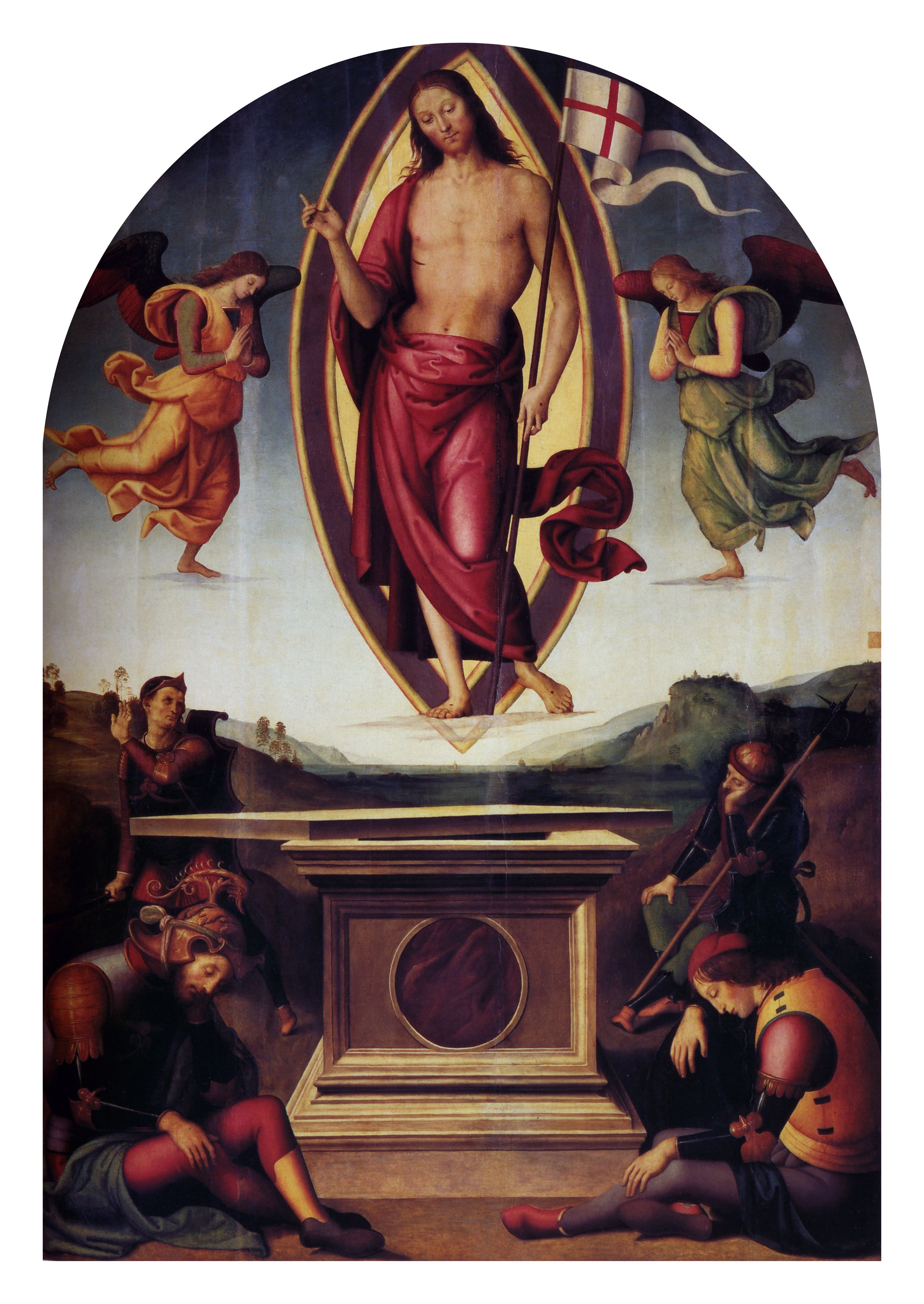 Pietro Perugino: Resurrezione. Cat. no. 53 in Vittoria Garibaldi: Perugino. Catalogo completo. Octavo, Firenze 2000, ISBN 88-8030-091-1